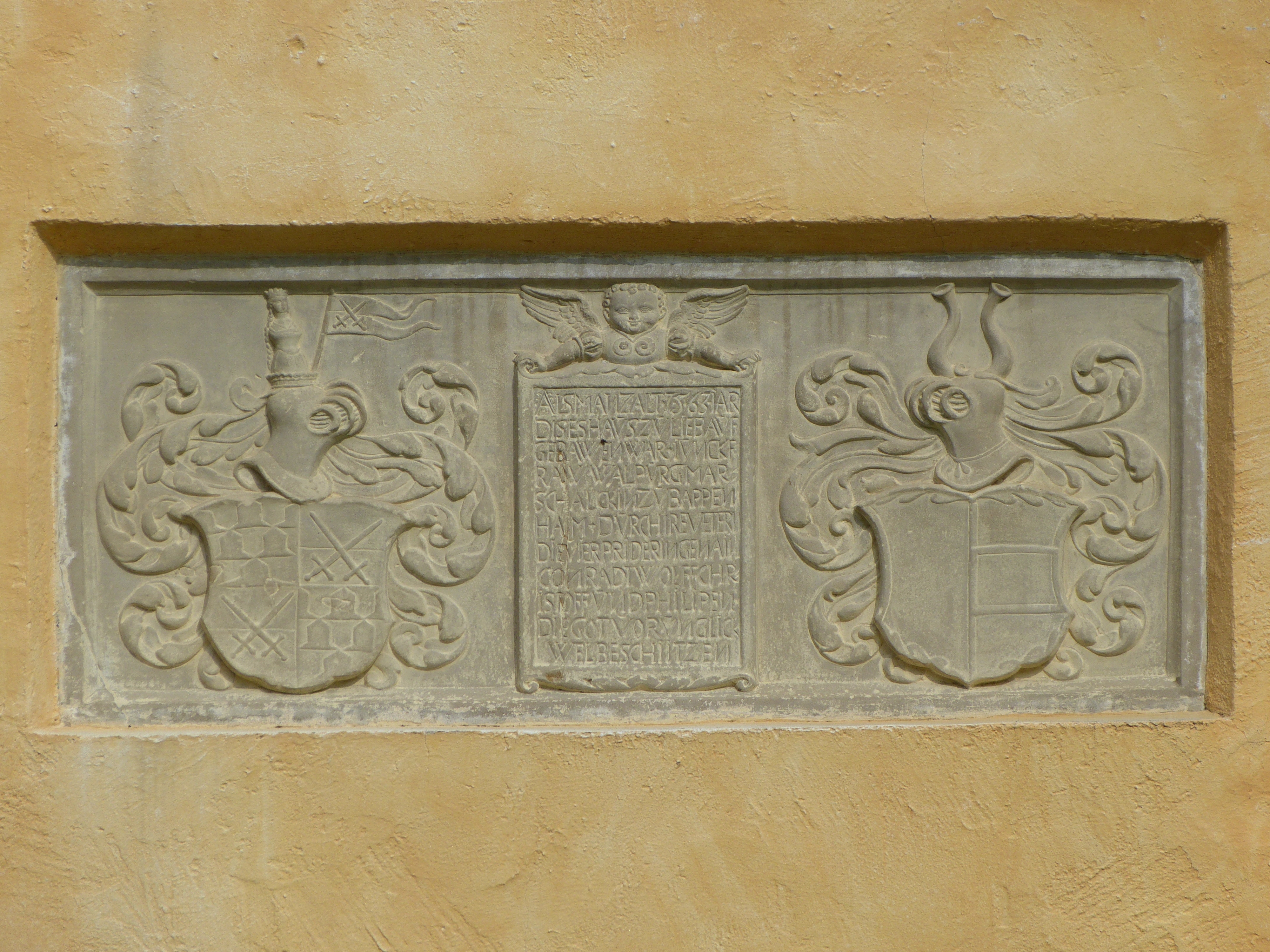 Unteres Schloss, Bad Grönenbach, Landkreis Unterallgäu, Bayern. Links das Pappenheimer Wappen, rechts das Wappen der Roth